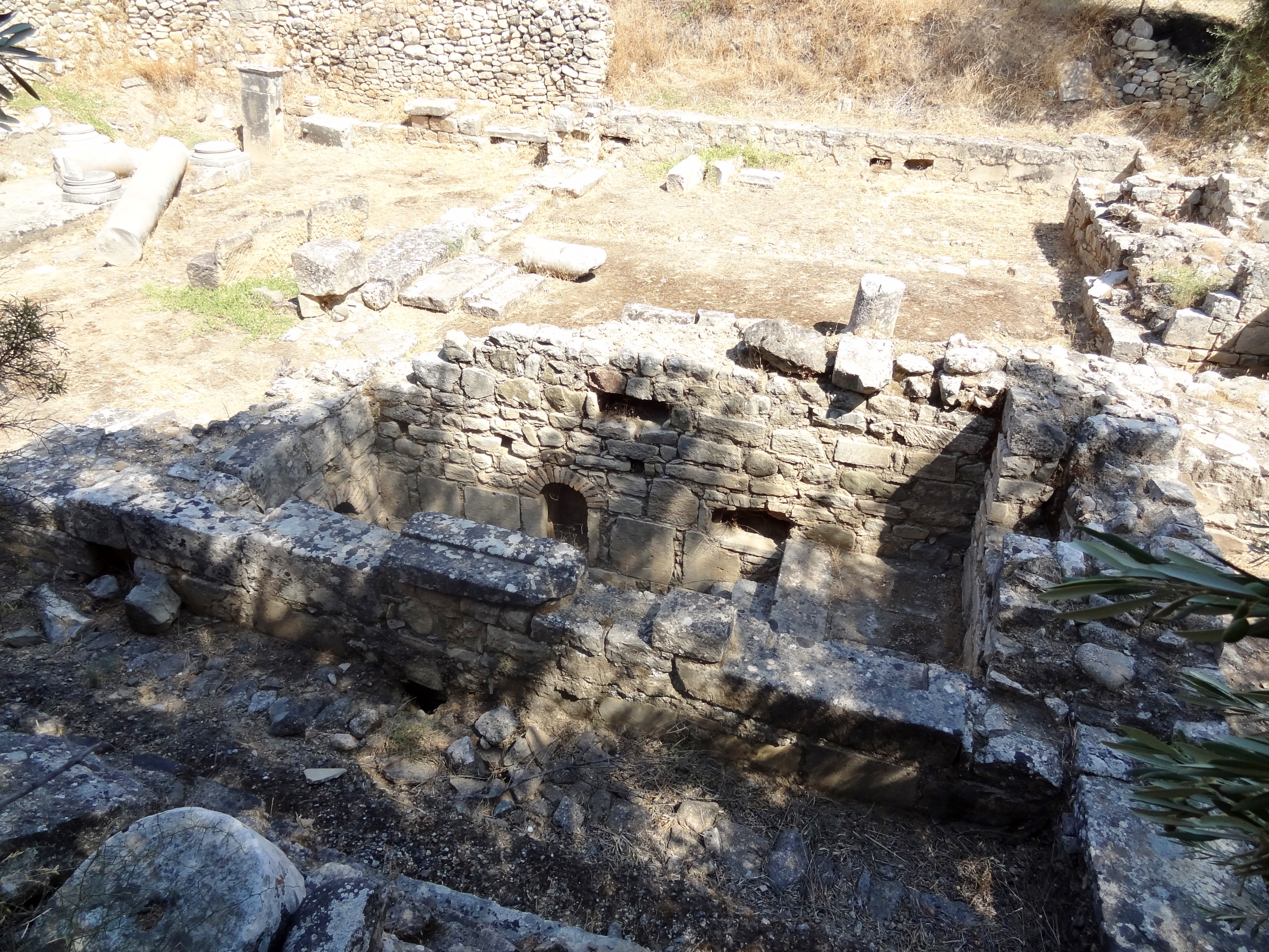 Reste der griechisch-römischen Stadt Gortyn (Γορτύν), Gemeinde Gortyna, Regionalbezirk Iraklio, Kreta, Griechenland